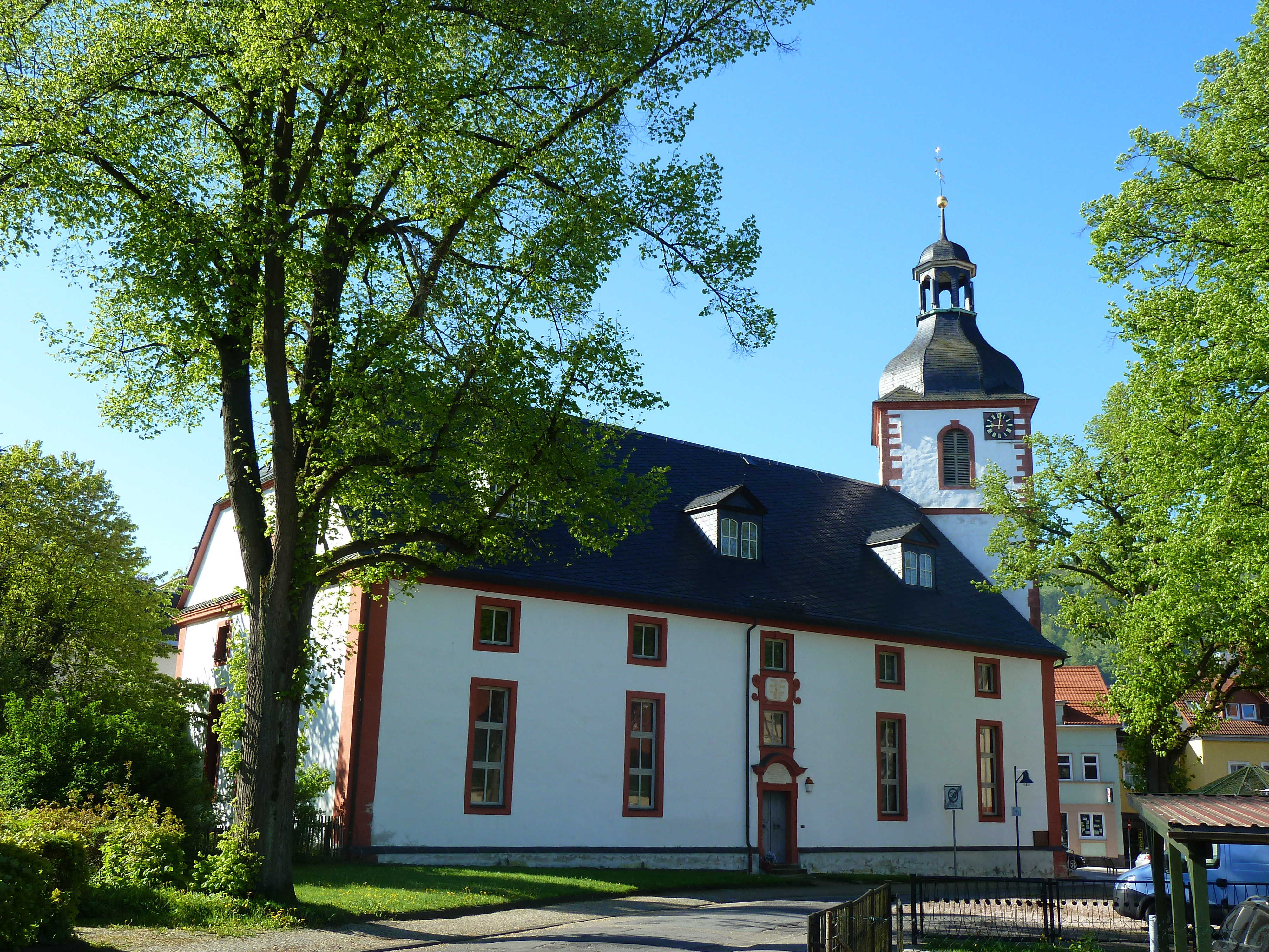 Kirche Mehlis Gesamtansicht